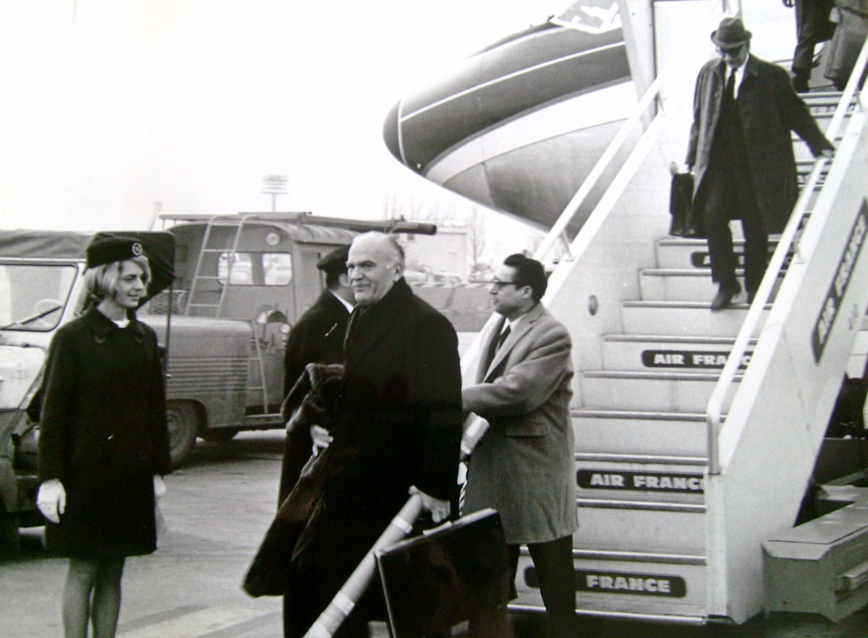 Travail personnel